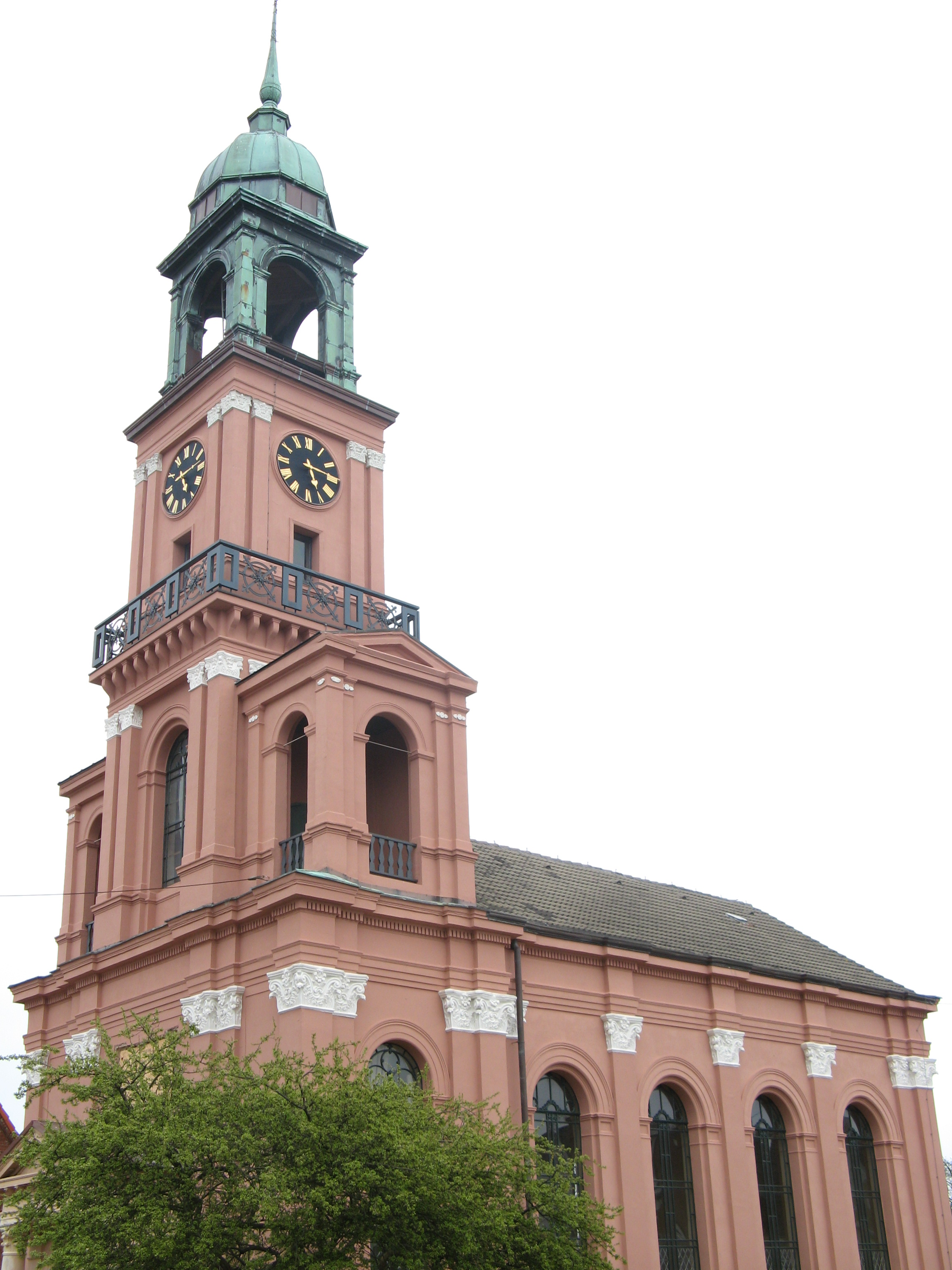 Remonstrantenkirche in Friedrichstadt 1909/1910 (Arch. Jan Verheul) Author: Dirk Ingo Franke